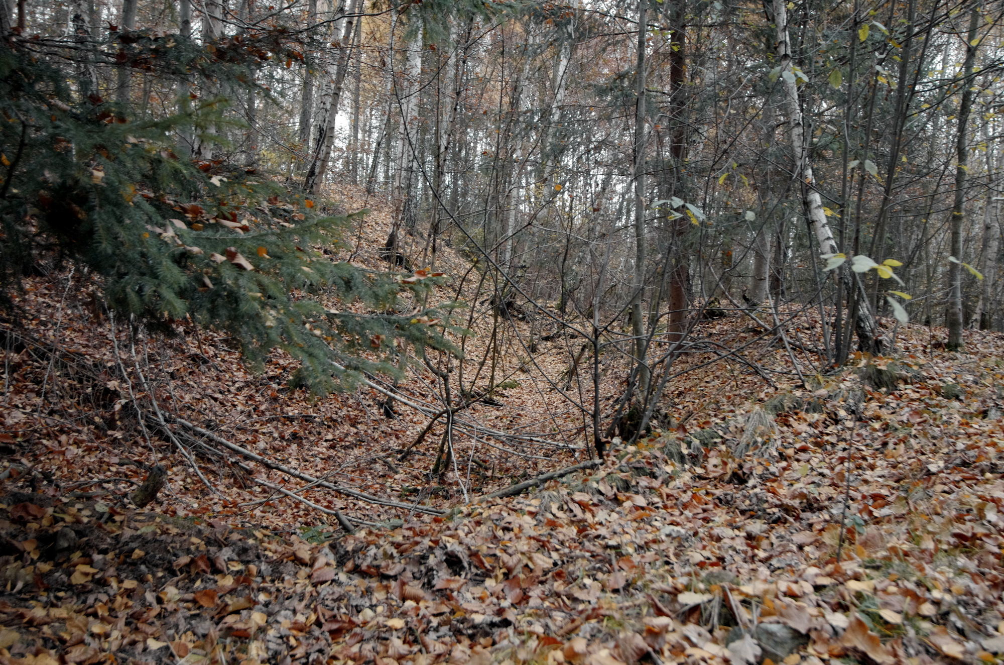 Hradiště a městiště Kolová, jižně od Libavského údolí, vrch Hradiště, kóta 511, Kolová (okres Karlovy Vary).